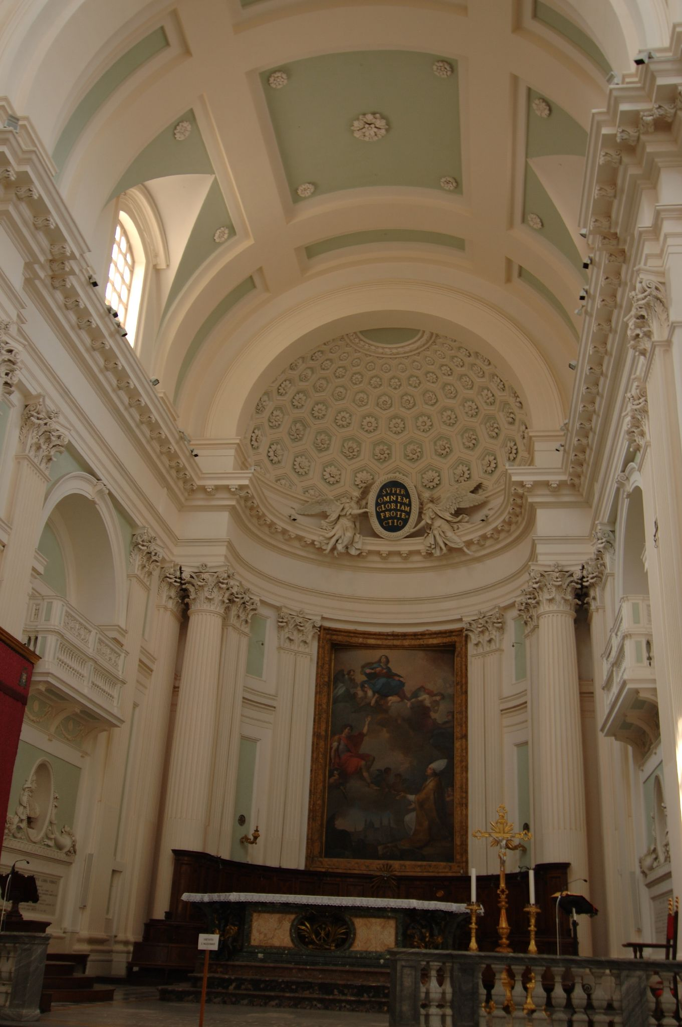 Urbino, Marche, Italia